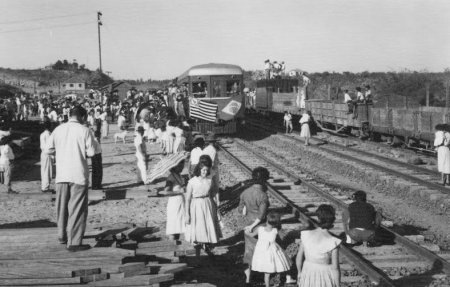 O primeiro trem da Sorocabana a chegar em Pirapozinho, em 1958